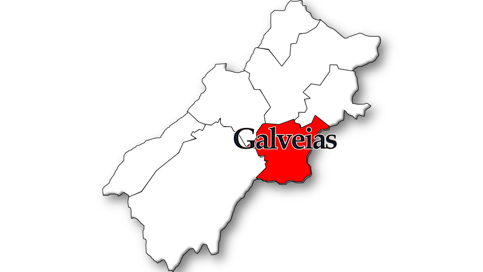 Evolução da População